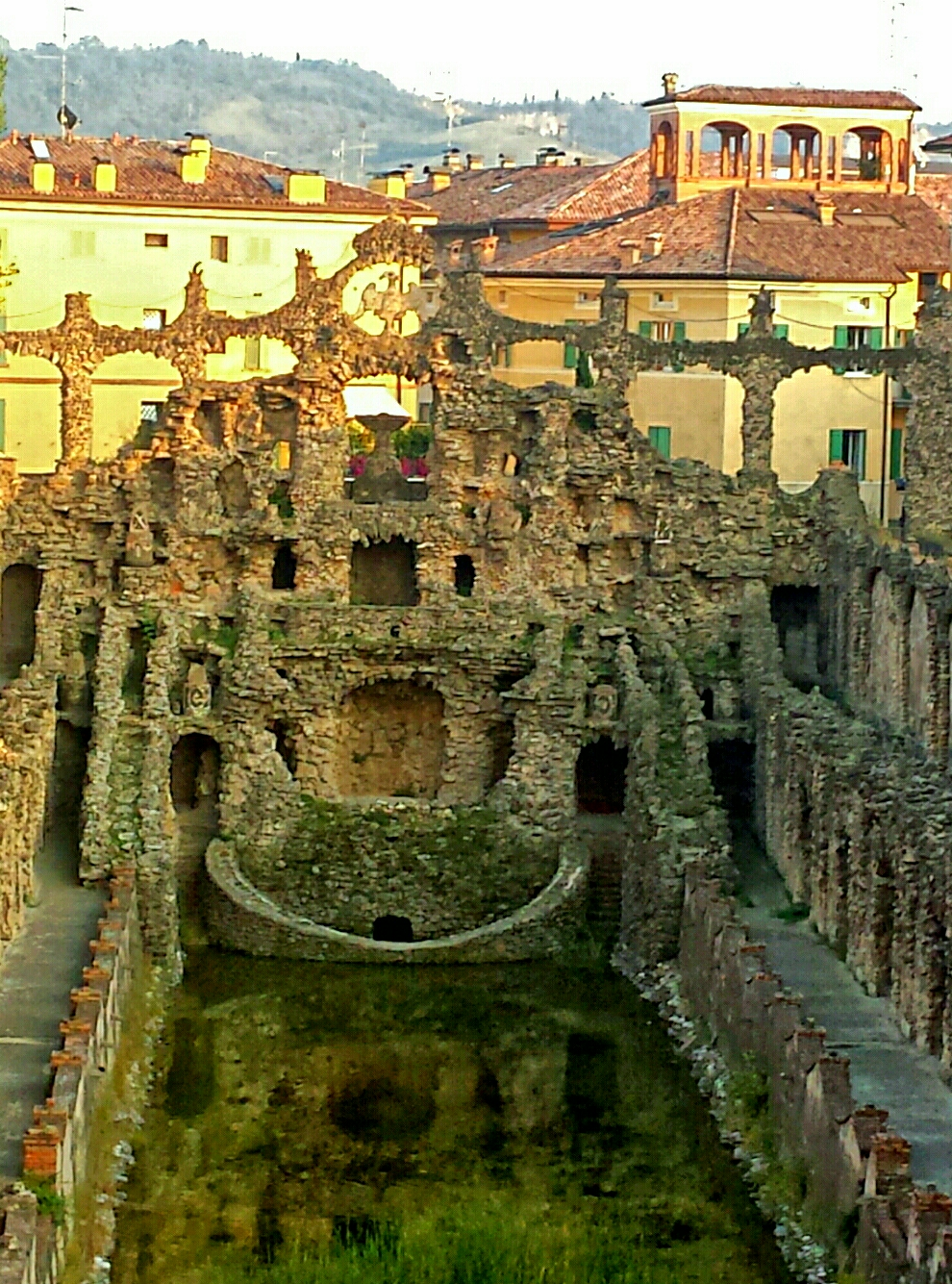 Palazzo Ducale - MIBAC This is a photo of a monument which is part of cultural heritage of Italy.